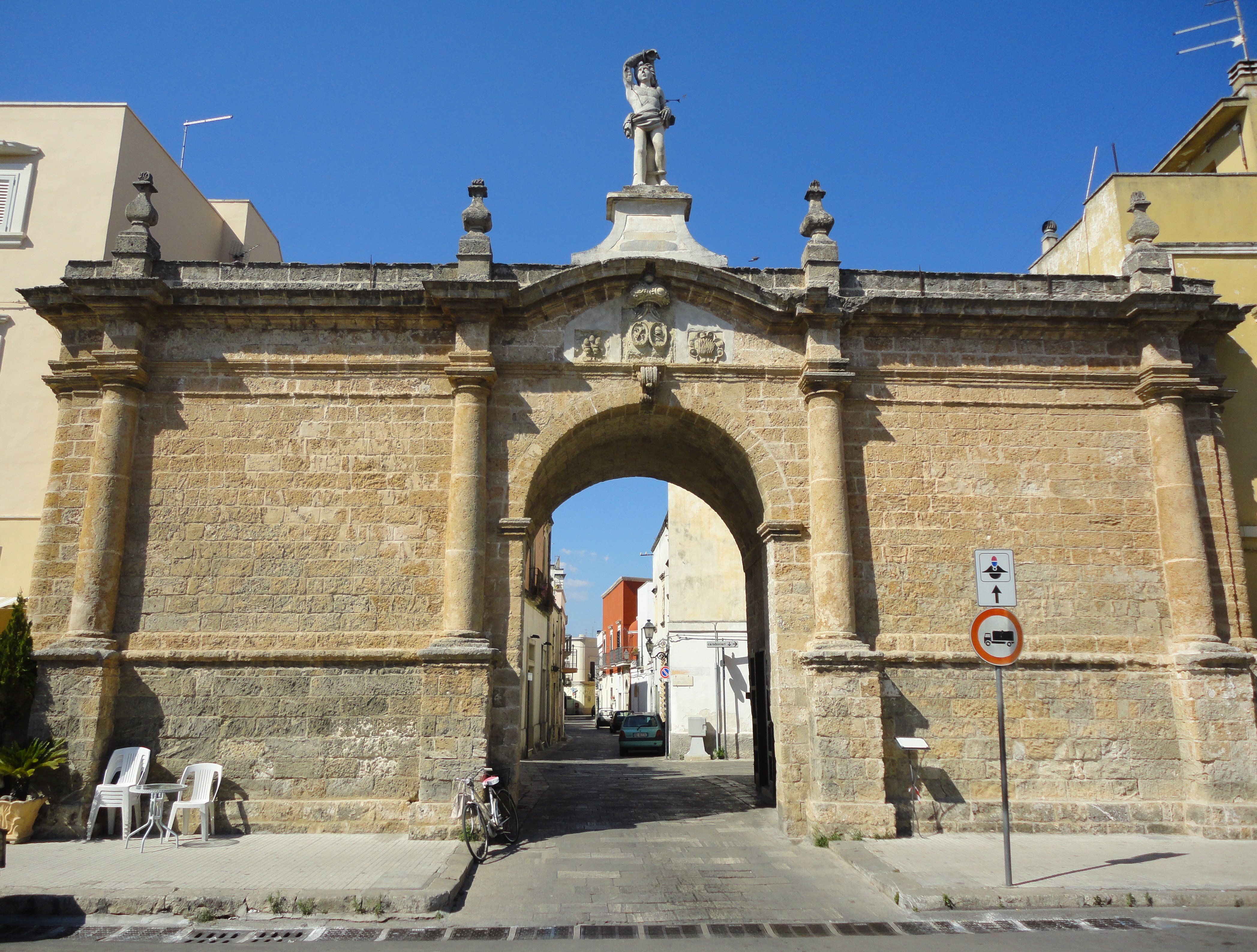 Porta San Sebastiano di Galatone, Lecce